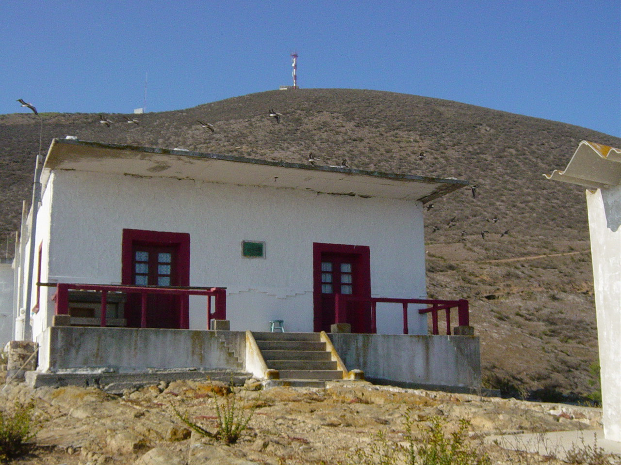 Departamento en que habitan los guarda faros.